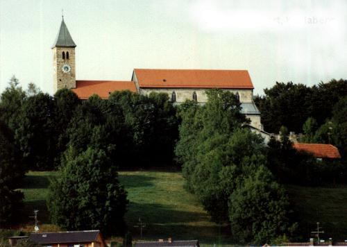 Pfarrkirche Wollaberg